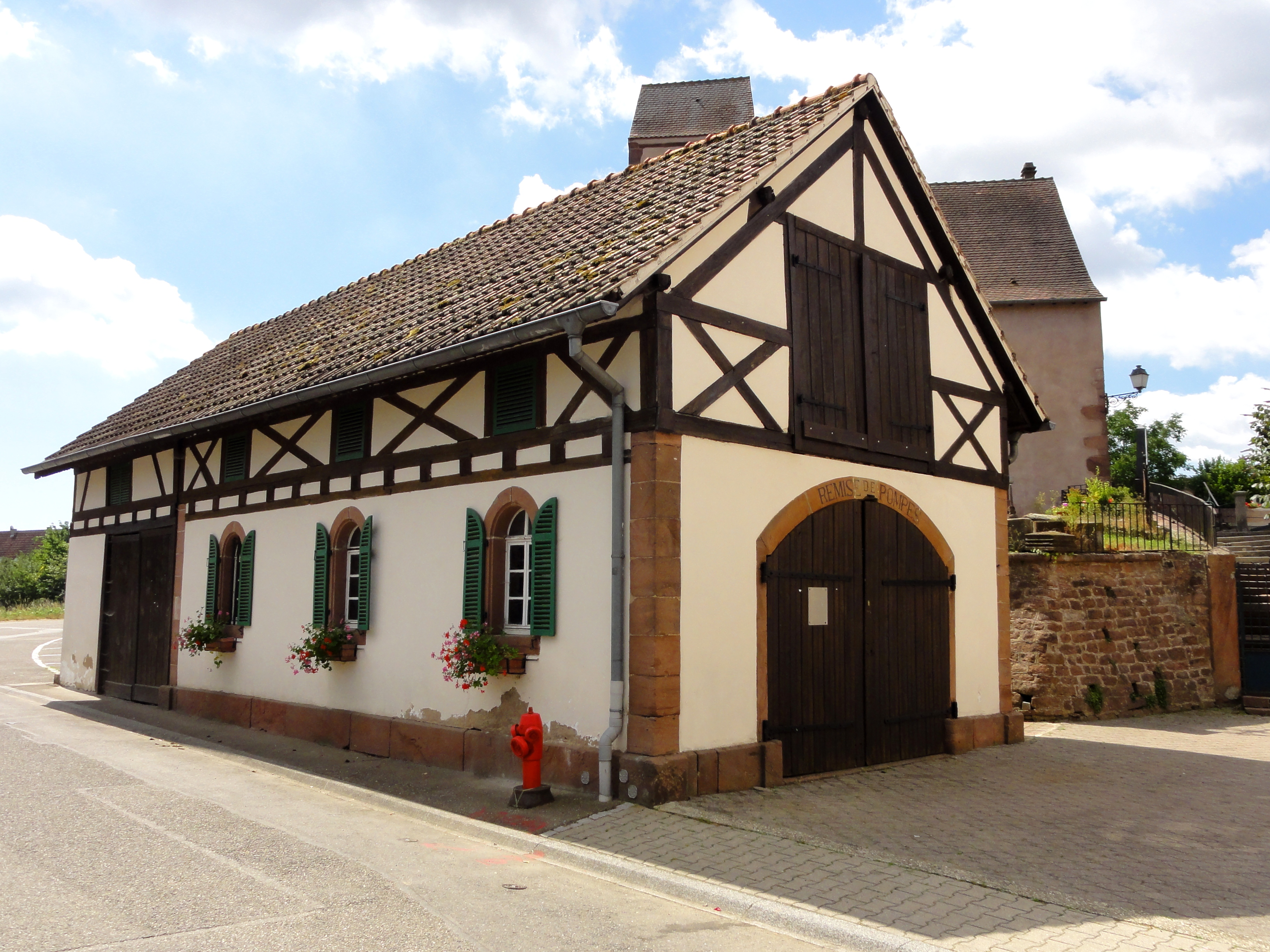 Alsace, Bas-Rhin, Bourgheim, Remise à matériel communal.